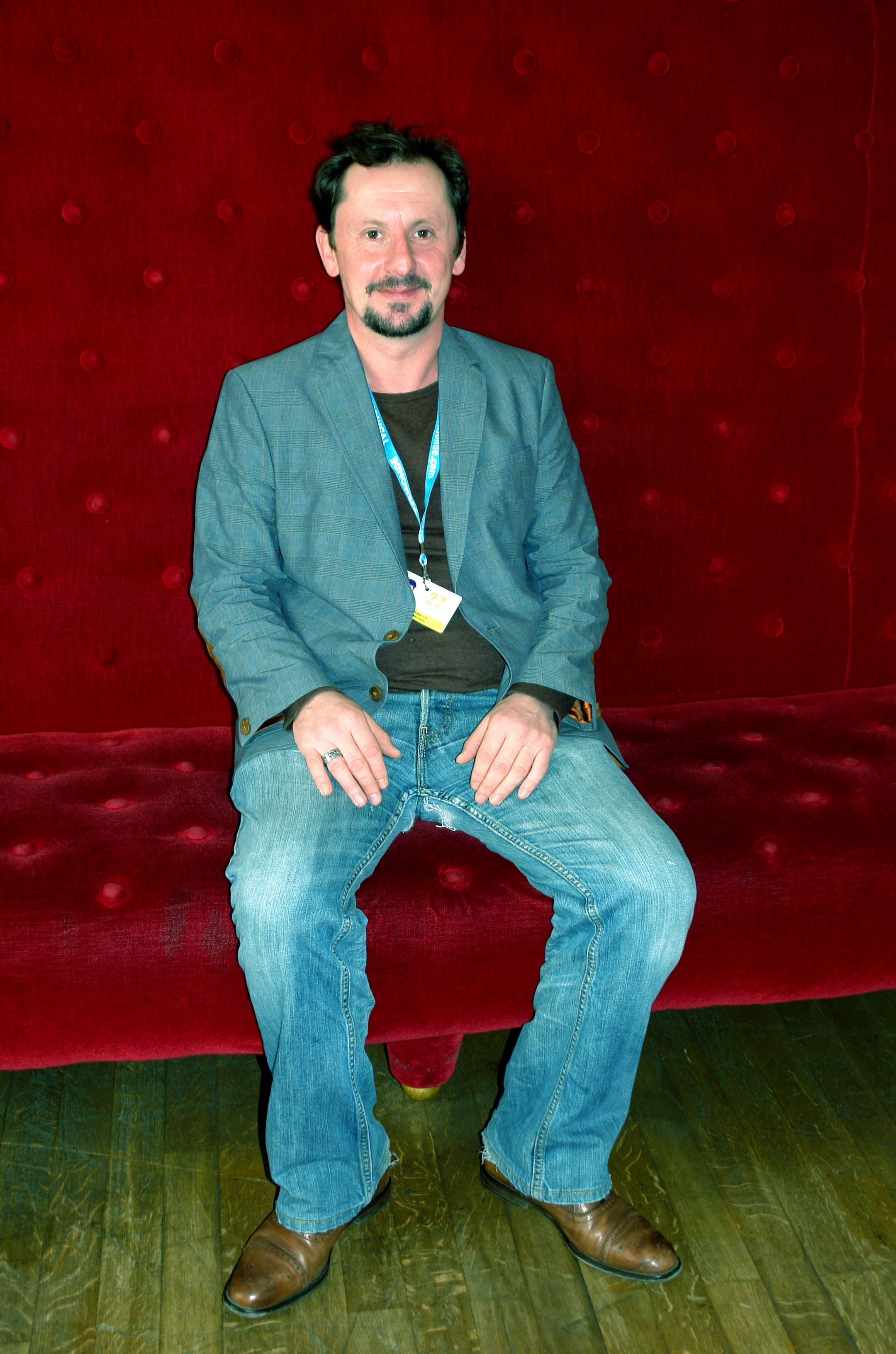 Jean Luc Couchard en 2012 au Festival international du film francophone de Namur.